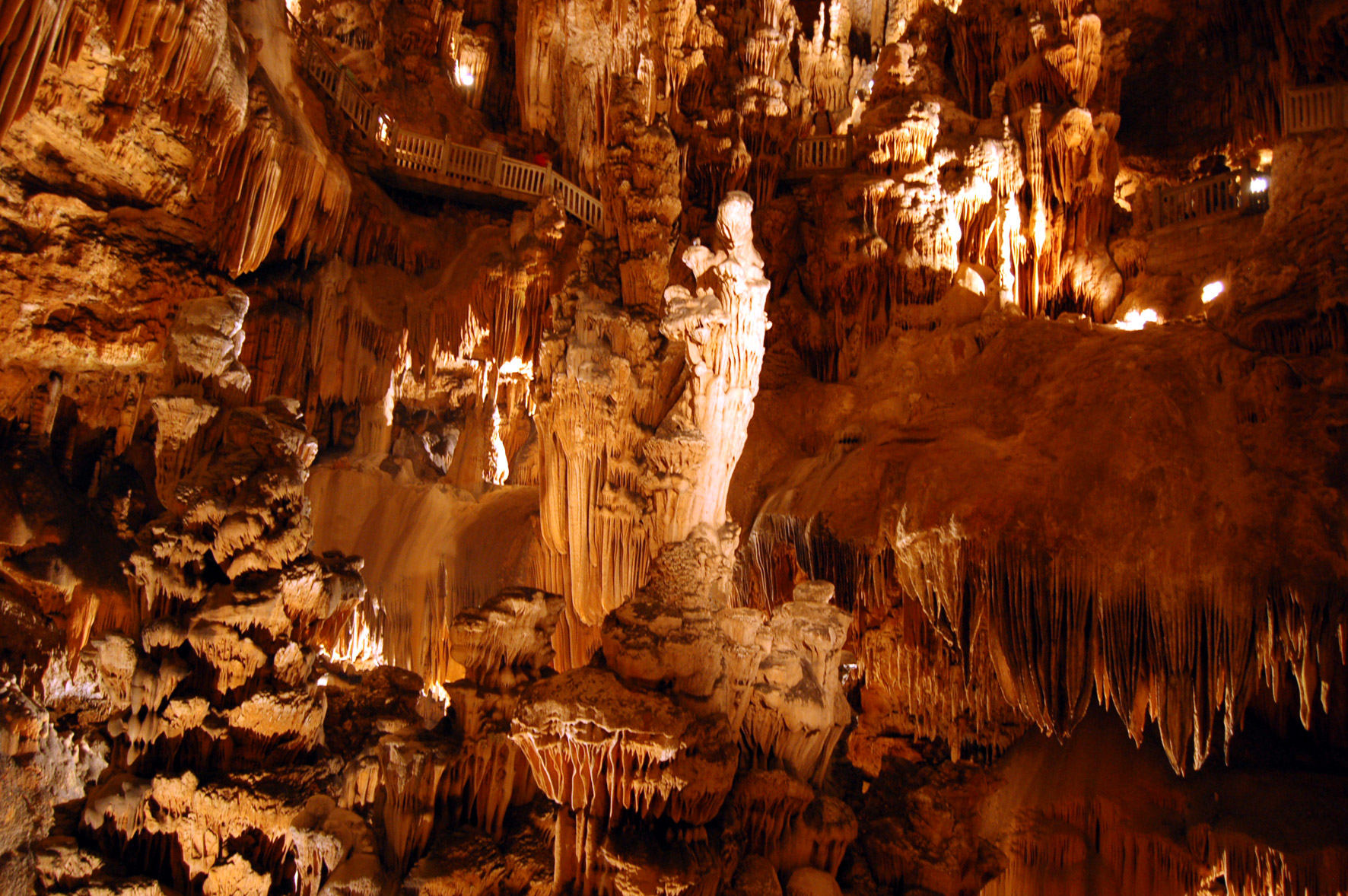 Grotte des Desmoiselles, Südfrankreich